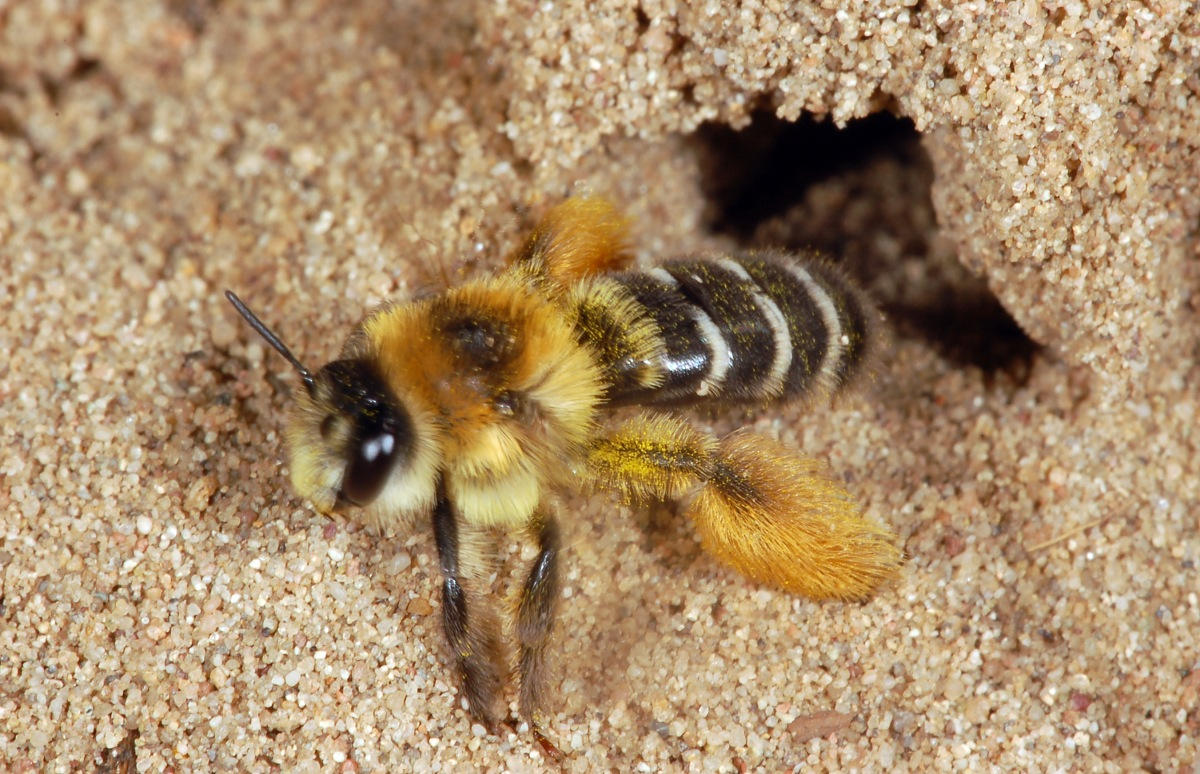 Dasypoda hirtipes, Weibchen, Eberstädter Düne, Darmstadt, Hessen, Deutschland